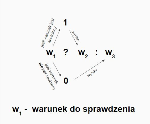 Graficzne przedstawienie działania operatora warunkowego w C++